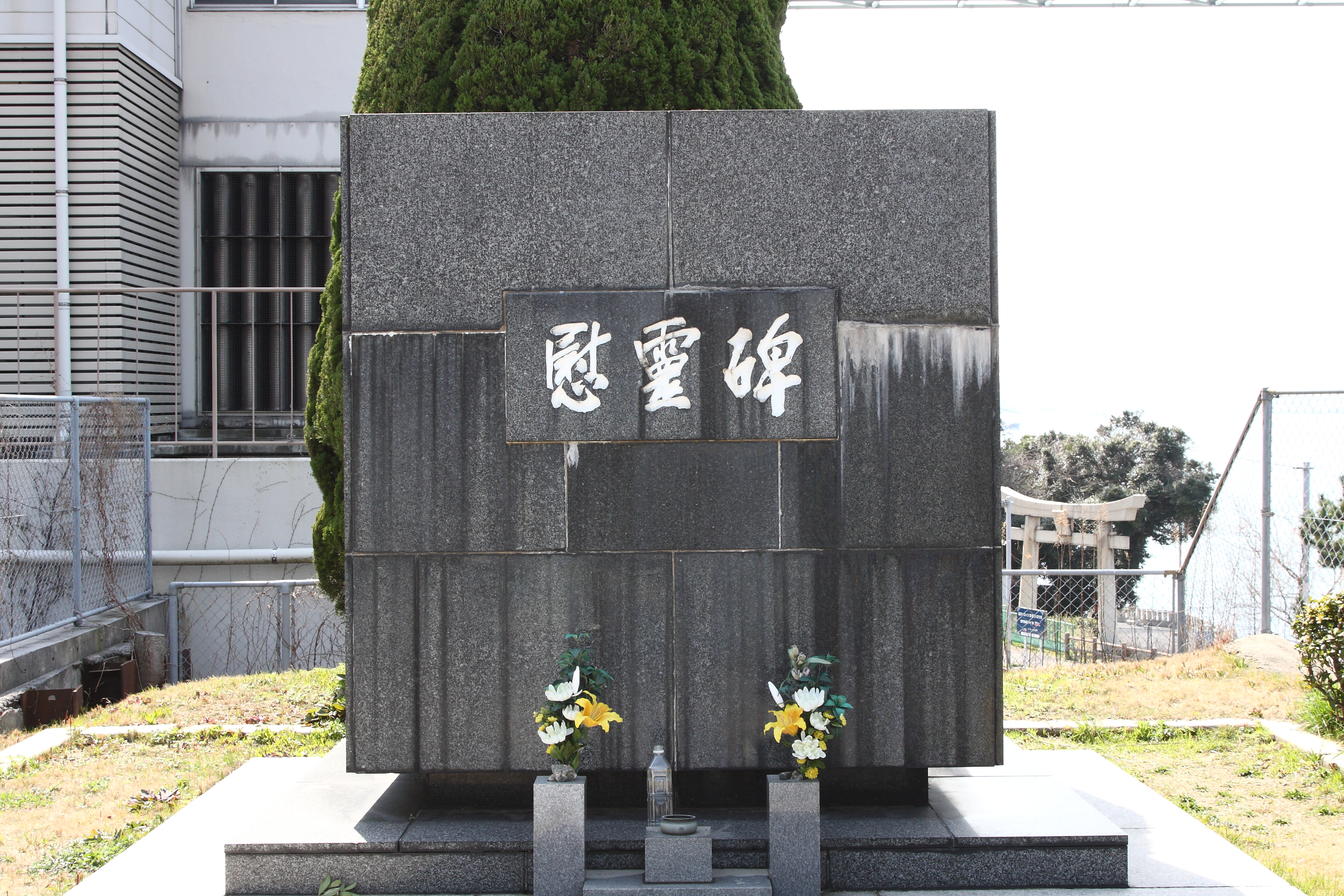 福岡県北九州市門司区 関門人道トンネル門司側入口付近